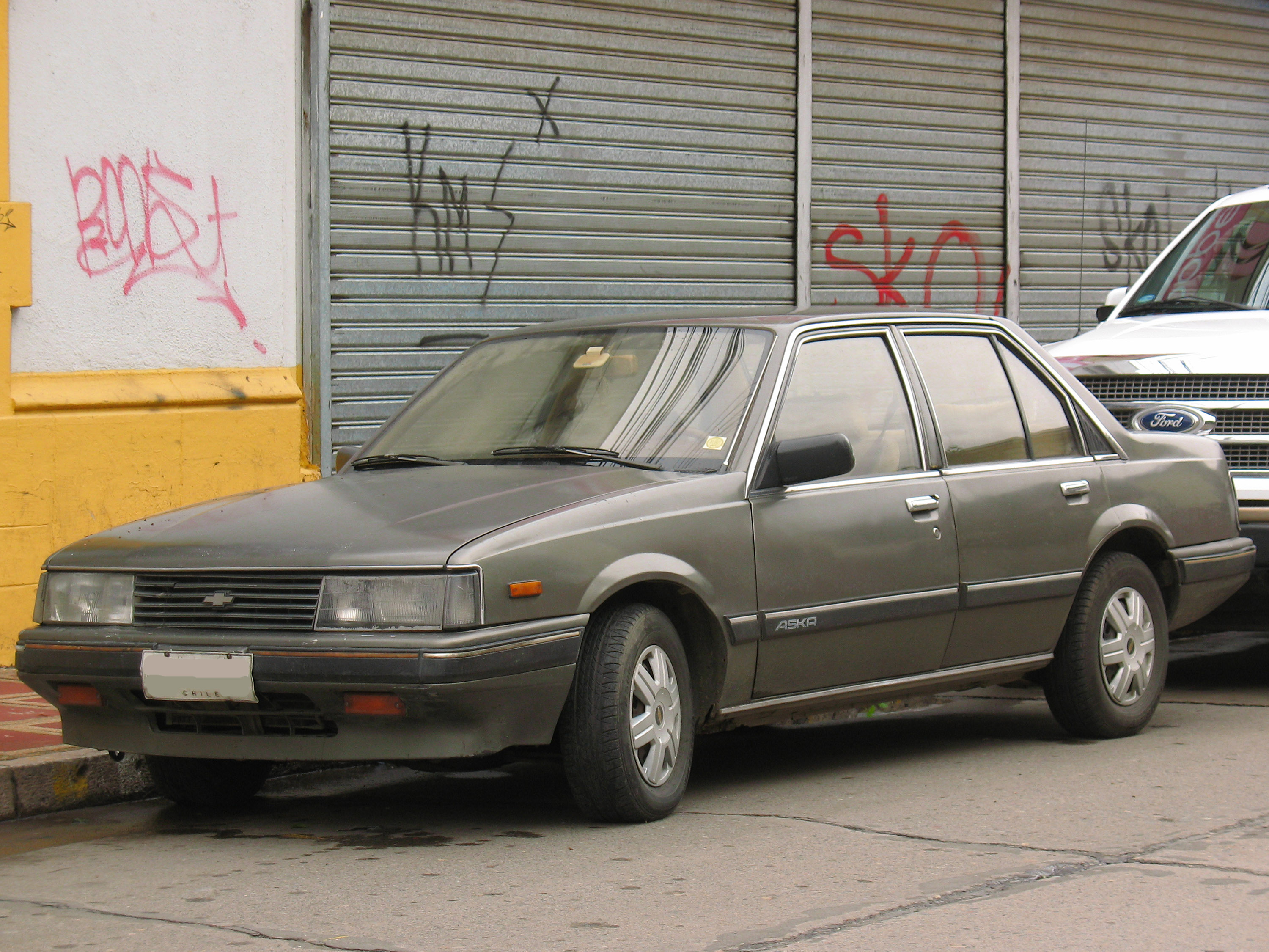 Chevrolet Aska 2.0 LX 1987